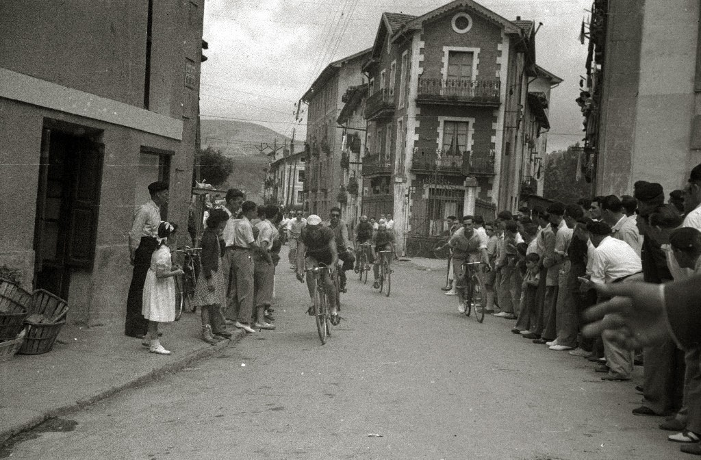 Título original: Celebración de una prueba ciclista por la localidad de Lasarte (5/5) Localización: Lasarte-Oria (Guipúzcoa)